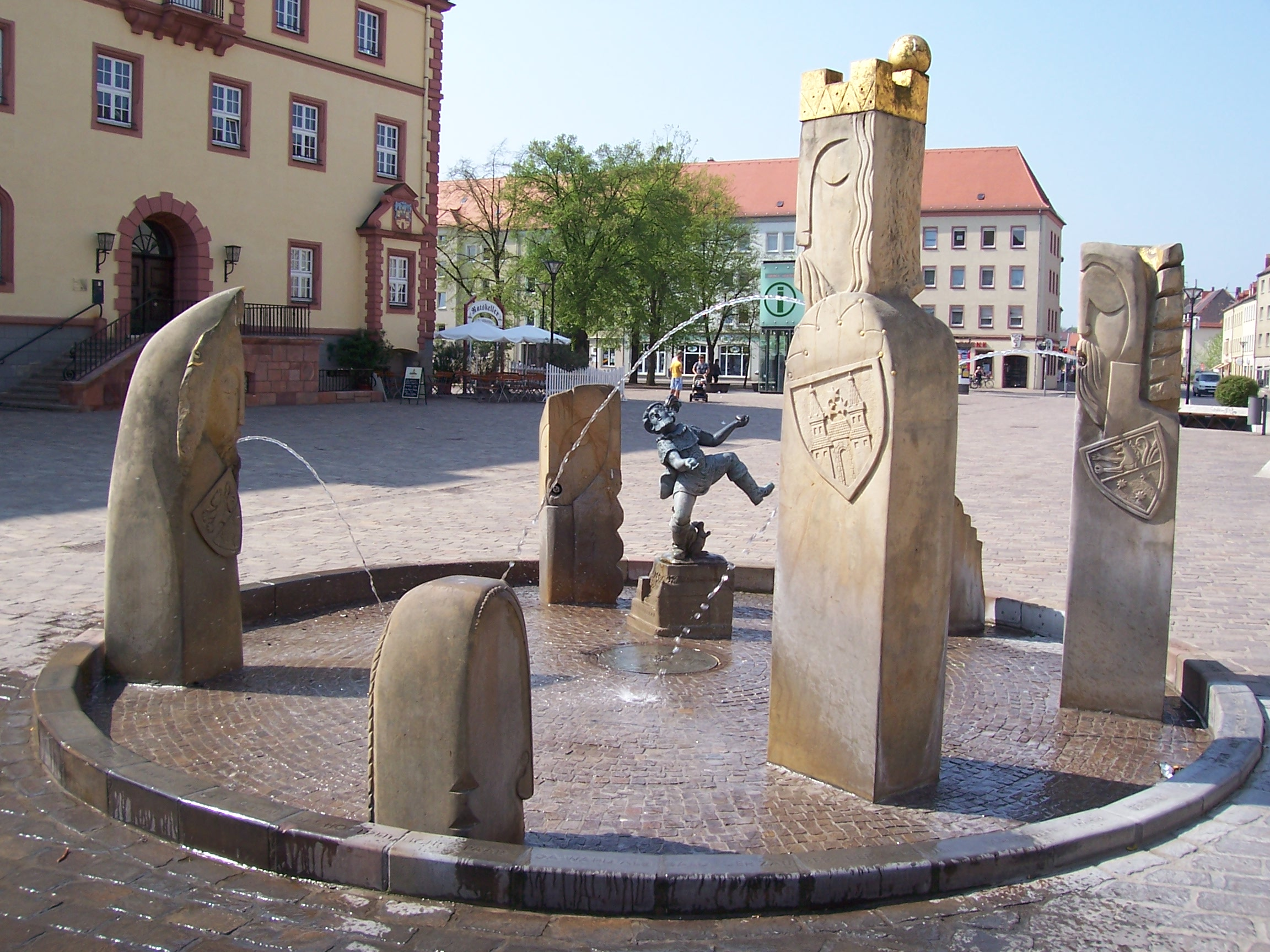 Marktbrunnen in Eilenburg, Bildhauer: Michael Weihe